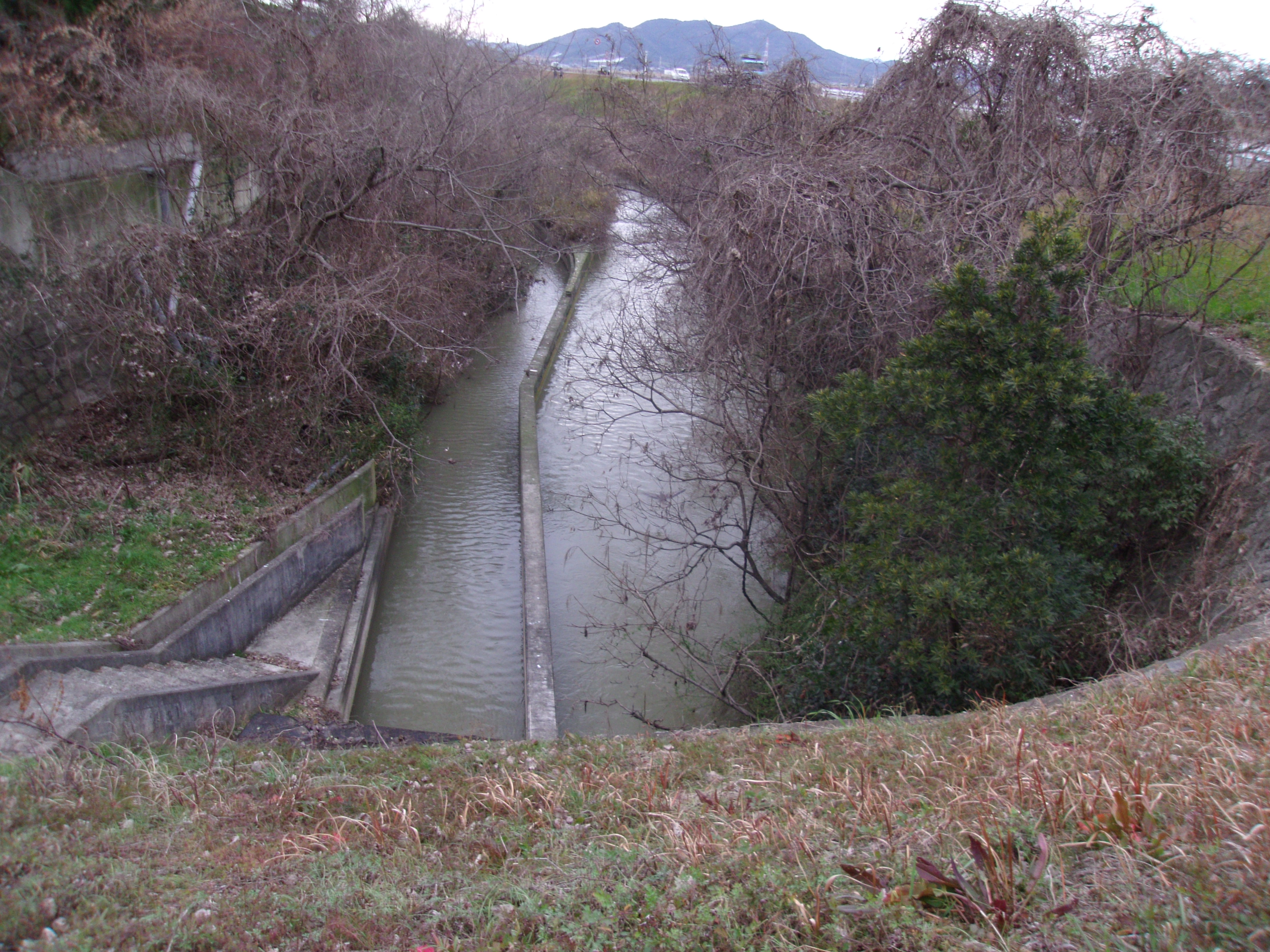 加古川に注ぐ草谷川樋門から取水された新井用水（左）と五ヶ井用水（右）